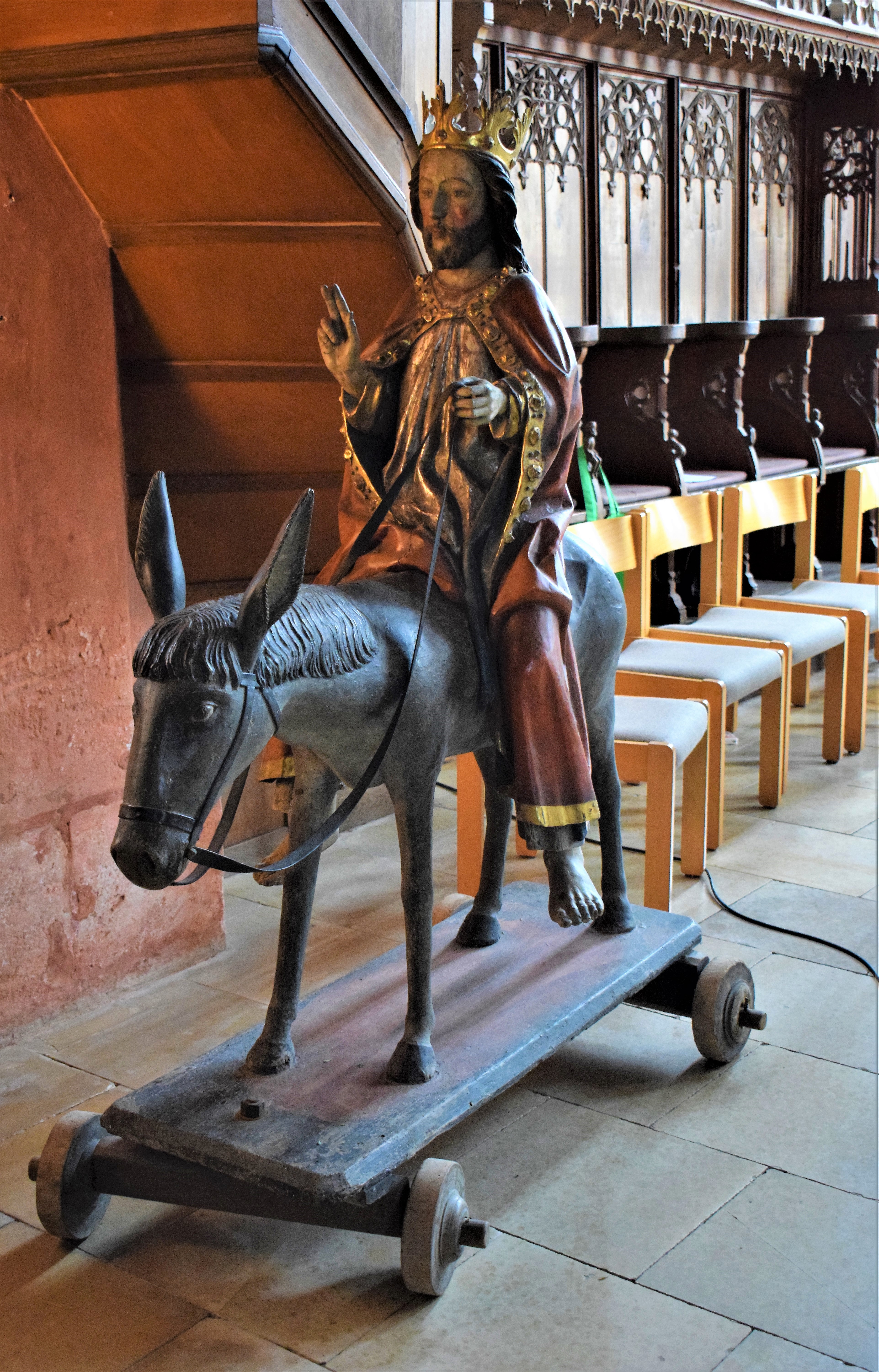 Rieterkirche Kalbensteinberg, Christus auf dem Palmesel (um 1470)